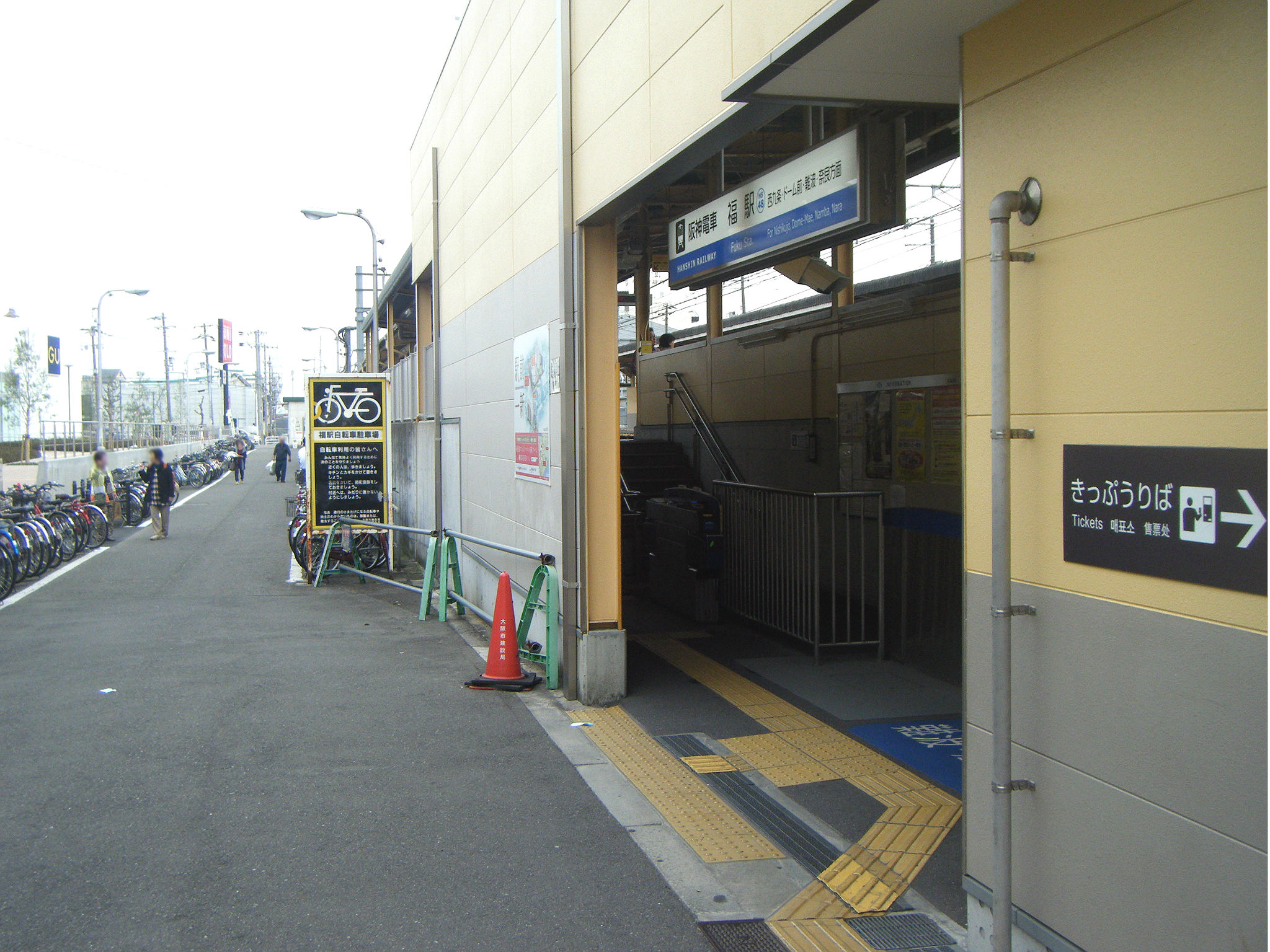 阪神なんば線 福駅 上り改札口